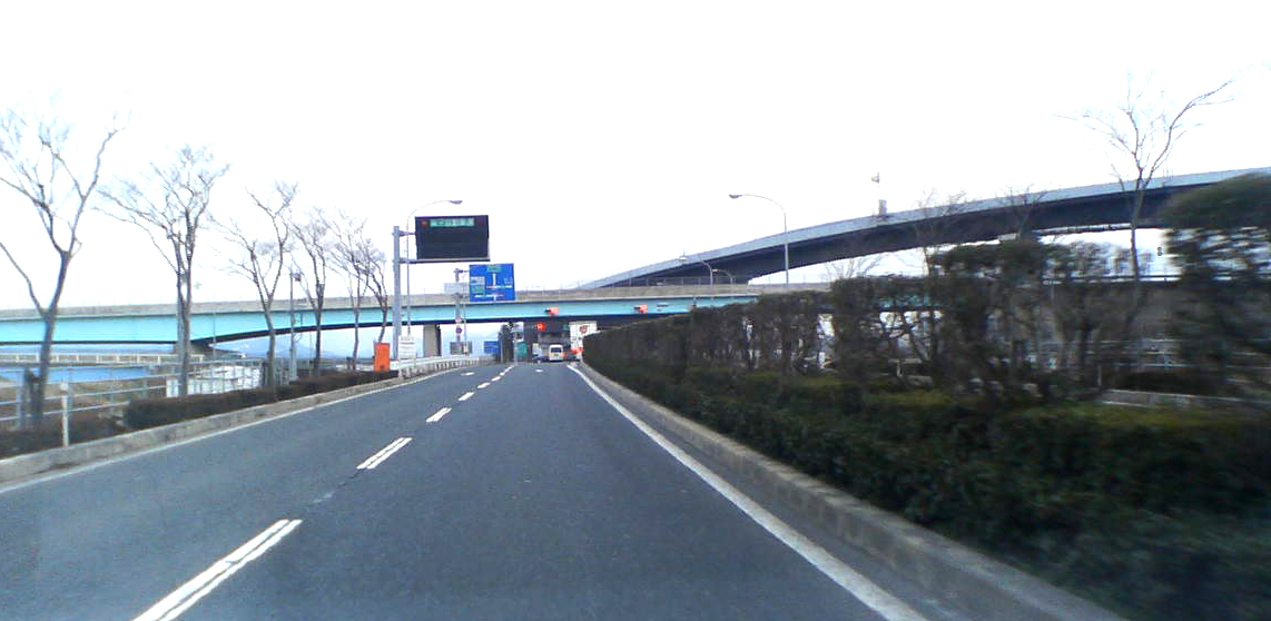 米子JCT